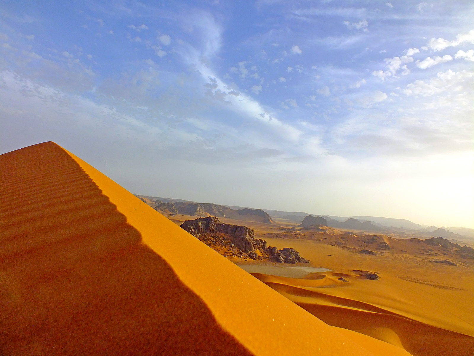 Parc rupestre du tassili, Algeria